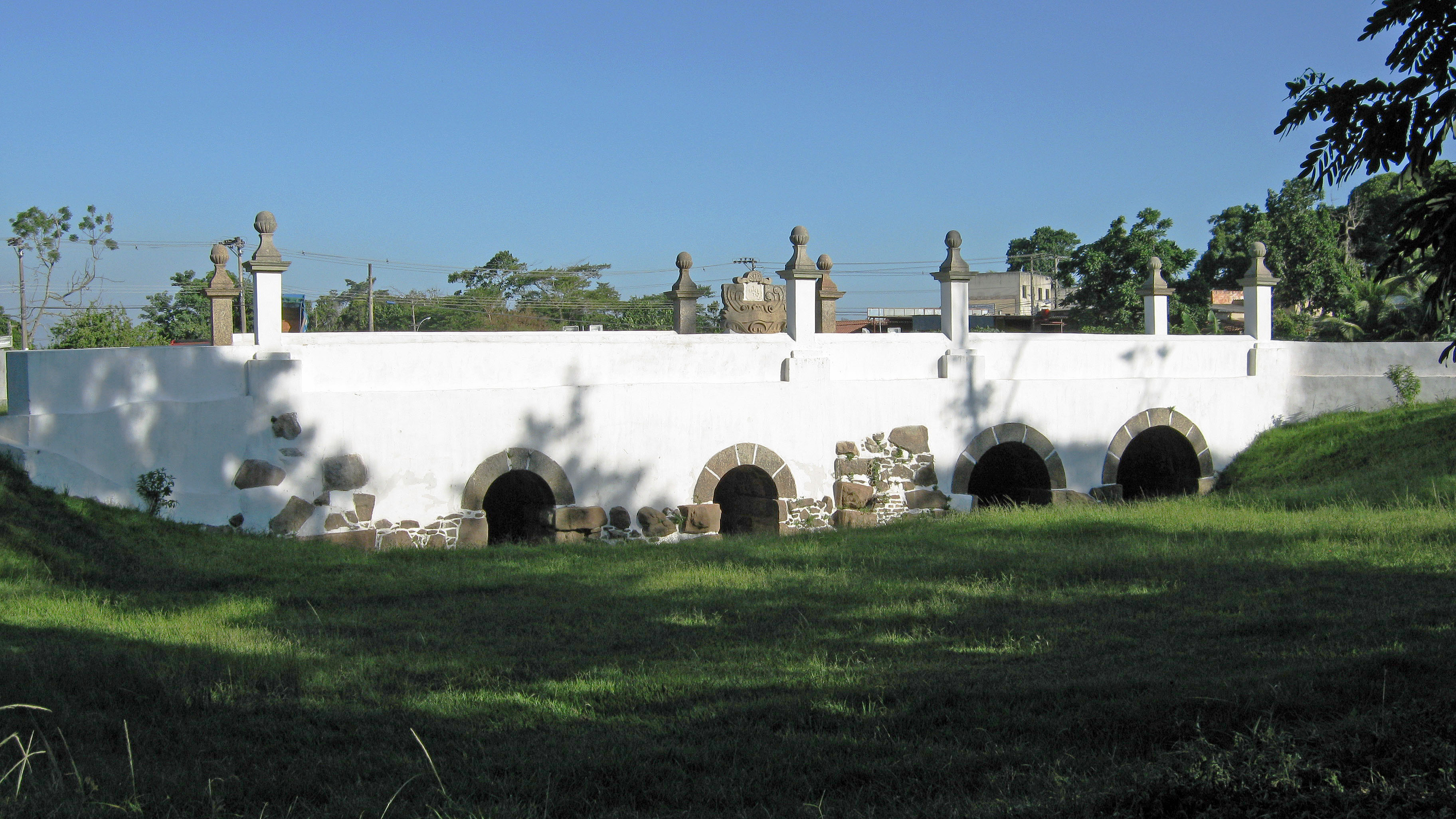 Antiga ponte-represa dos Jesuítas de 1752 sobre o Rio Guandu na Estrada do Cortume em Santa Cruz.